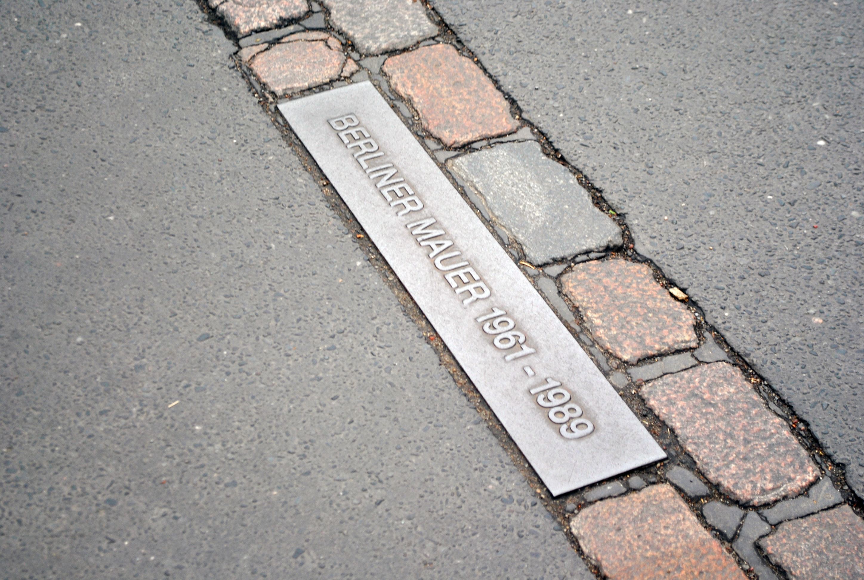 En la Stresemannstraße